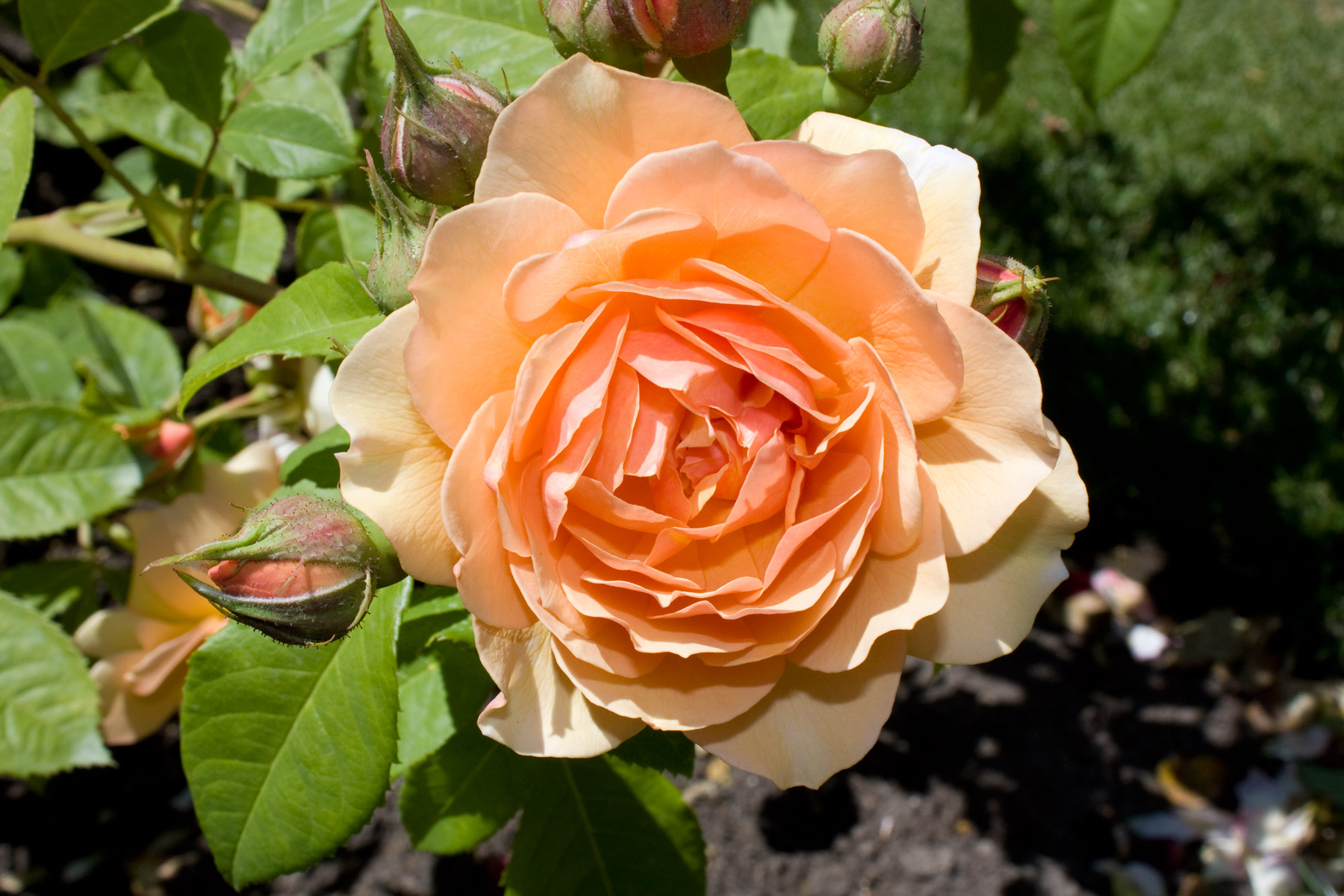 Grace